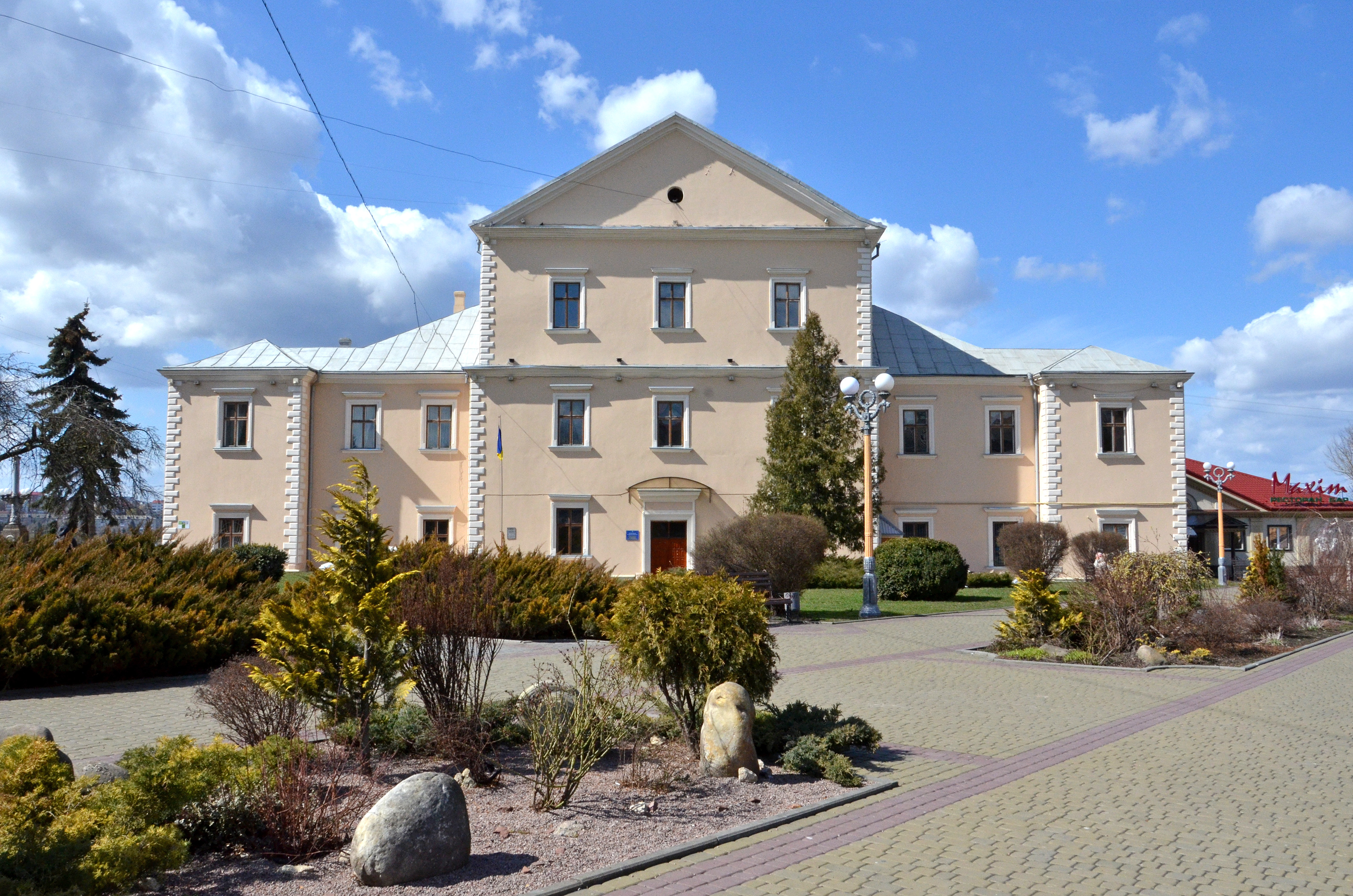 Тернопільський замок у березні 2016 року.